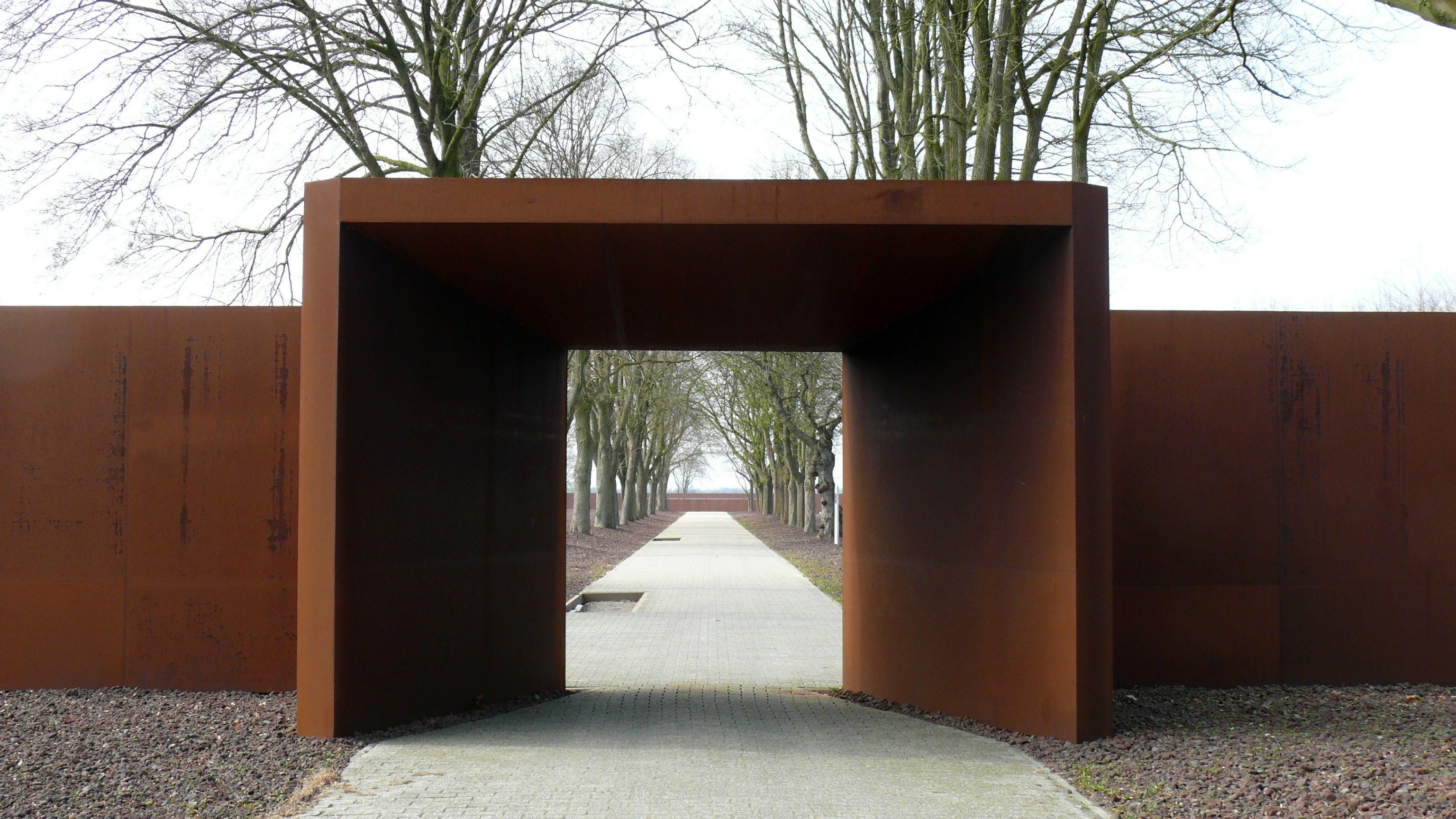 Gedenkstelle "inneres Tor" in der Gedenkstätte Esterwegen.